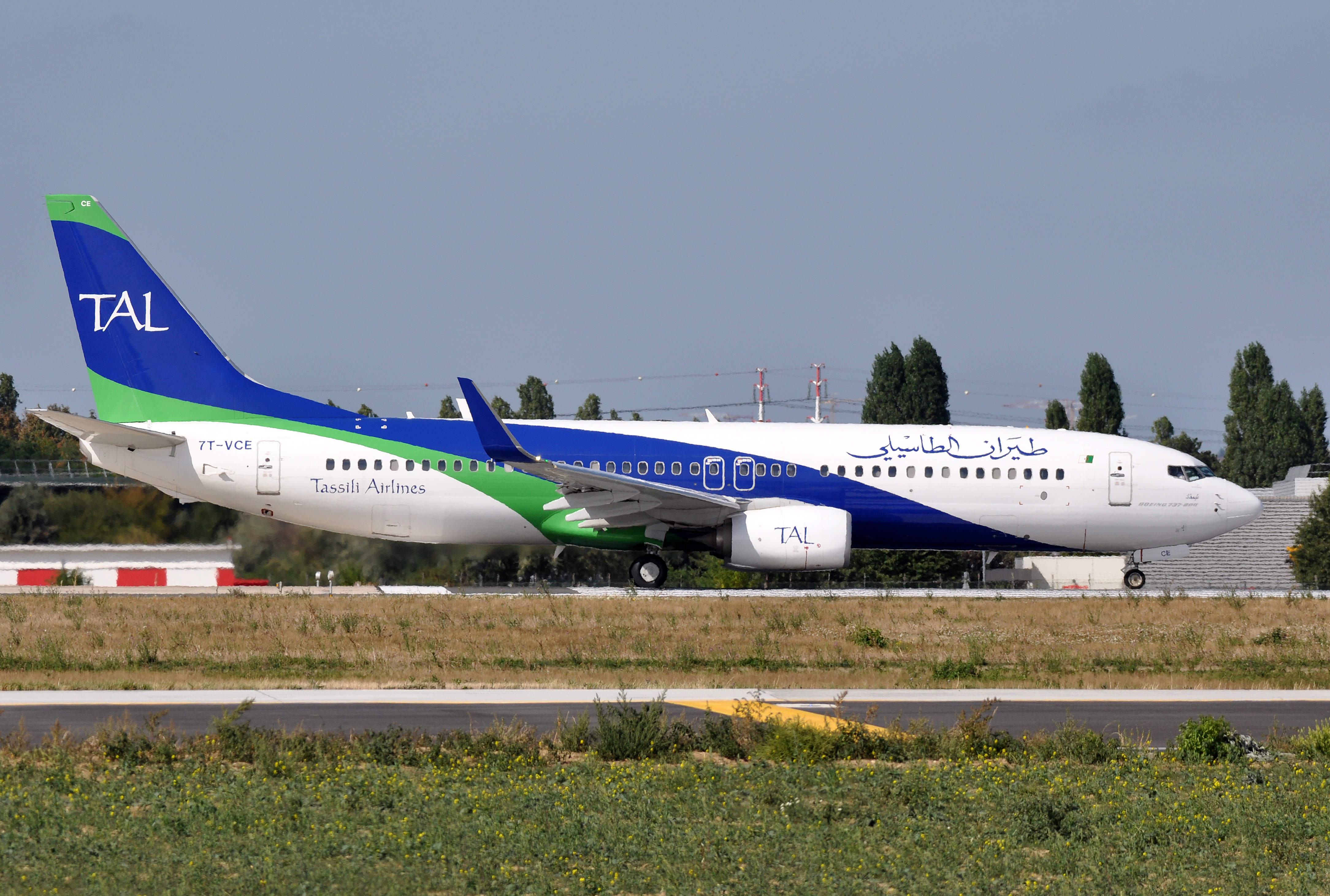 MSN 64986 LN 7139 B737-8ZQ / 737 / 737-800 TASSILI AIRLINES ORY AIRPORT